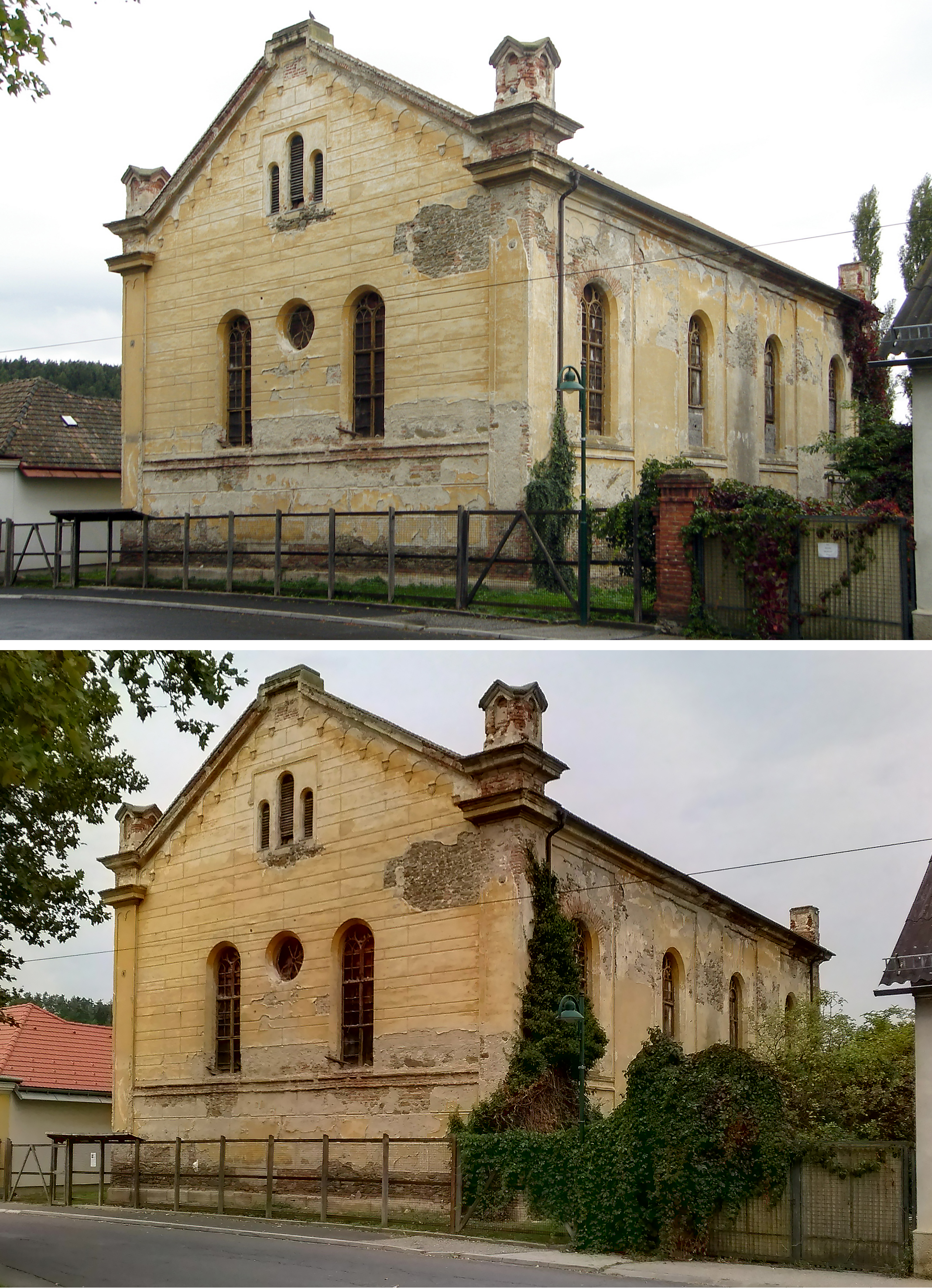 Kobersdorf, ehemalige Synagoge im Oktober 2006/2016